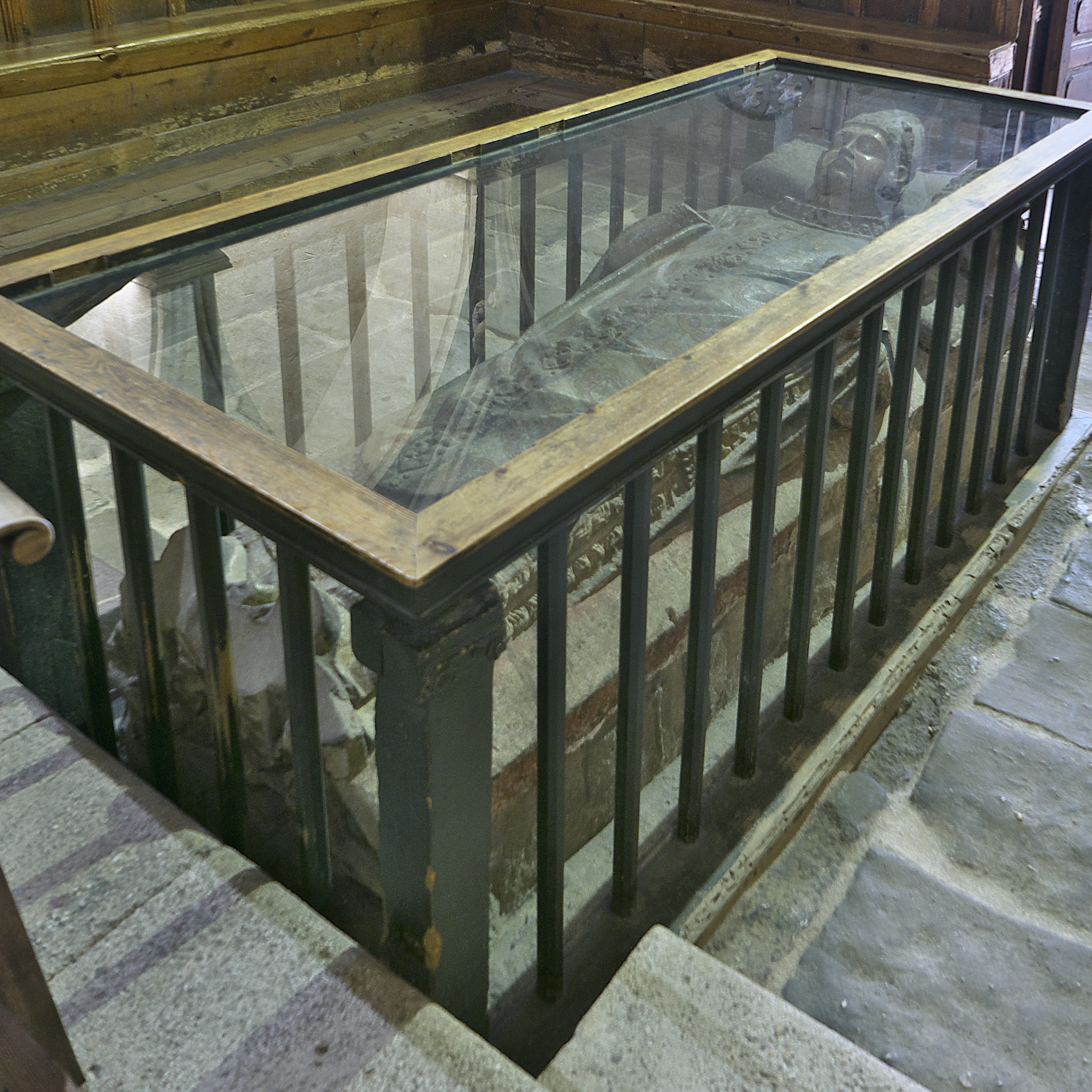 Capilla de Santa Bárbara, claustro de la Catedral Vieja de Salamanca. Sepulcro de Juan Lucero (†1362), obispo de Salamanca y de Segovia.